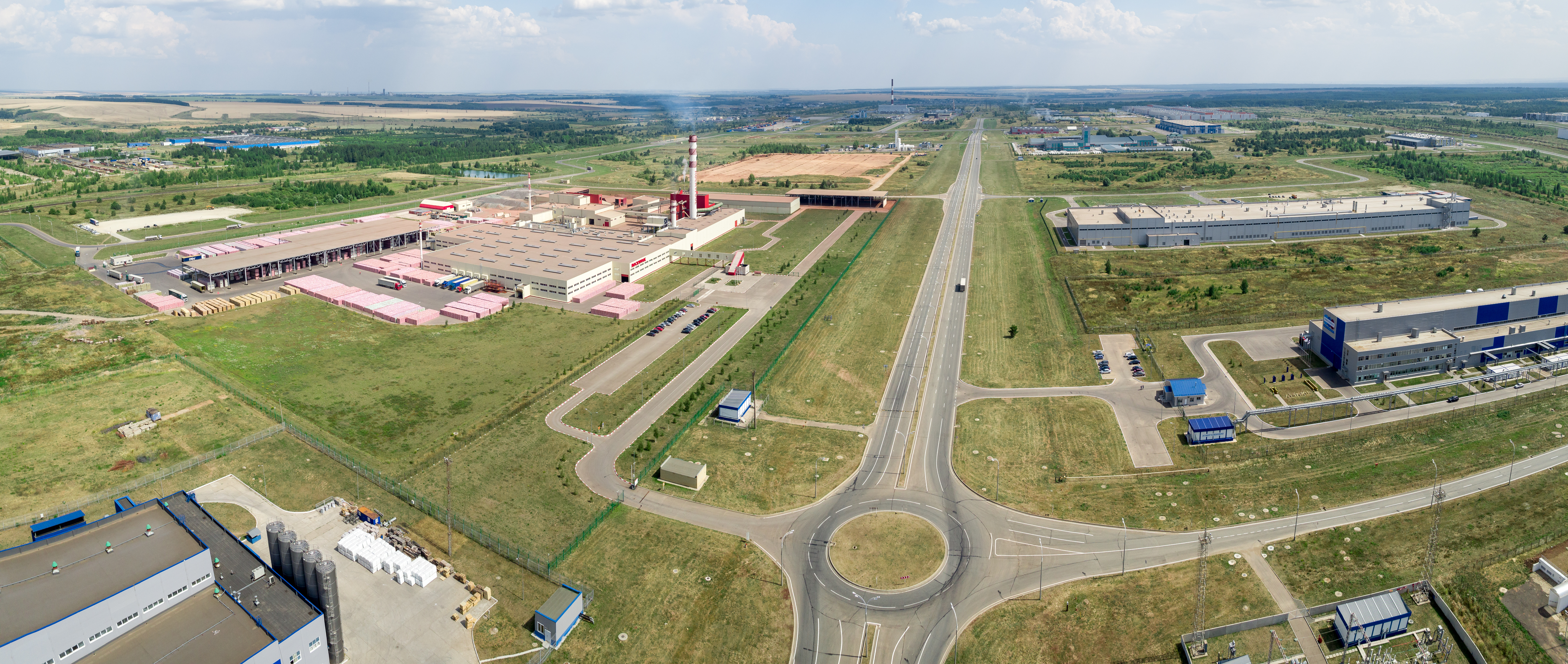 Улица Ш-2 ОЭЗ "Алабуга"